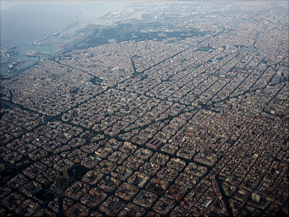 Eixample de Barcelona vist des de l'aire